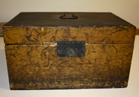 Boksen inneholdt Bergen Brannkorps Begravelseskasse sitt rekneskapsmateriale. Materialet er avlevert Bergen Byarkiv.